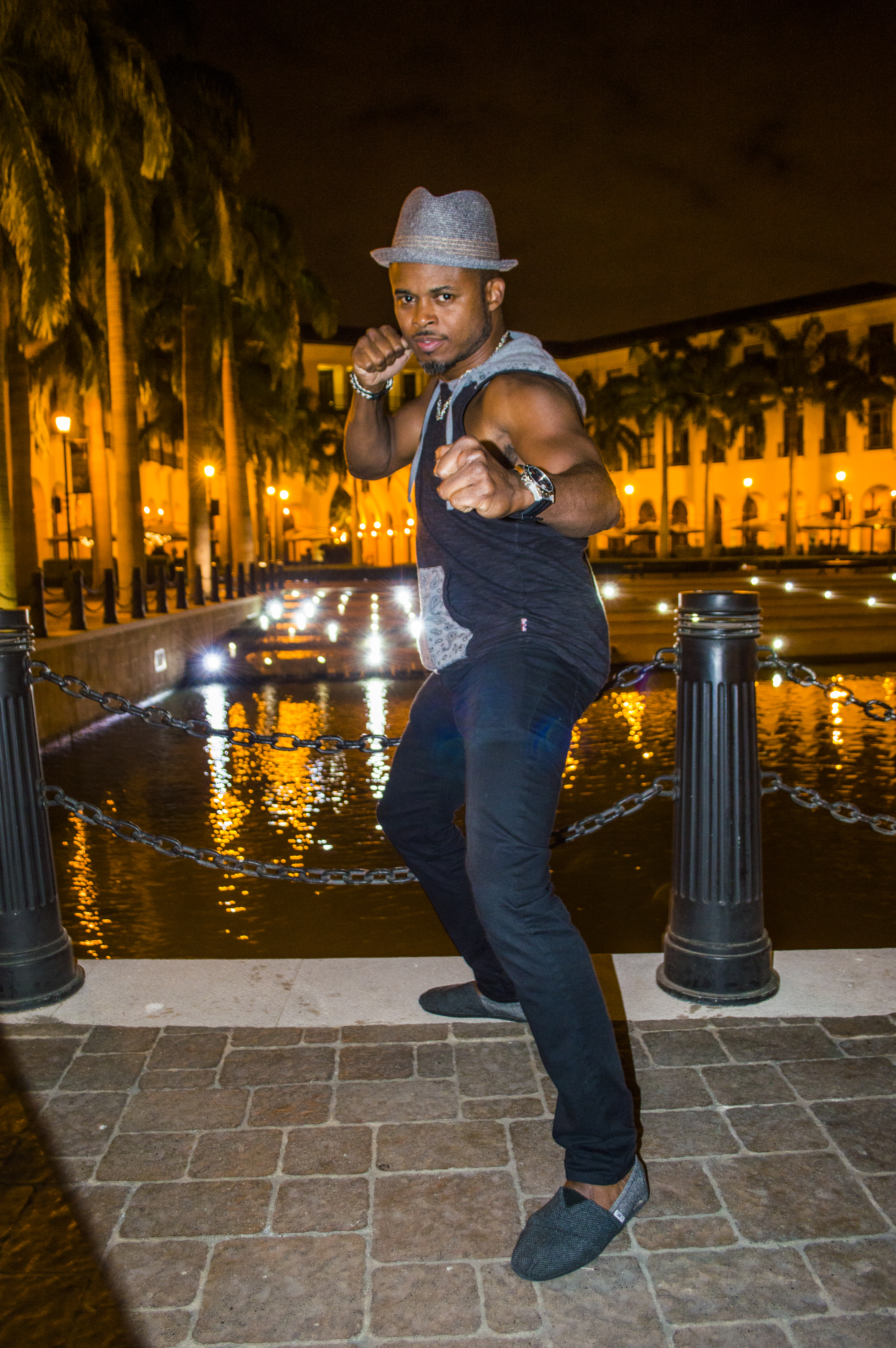 Walter E Jones en 2016, en Guayaquil, Ecuador.